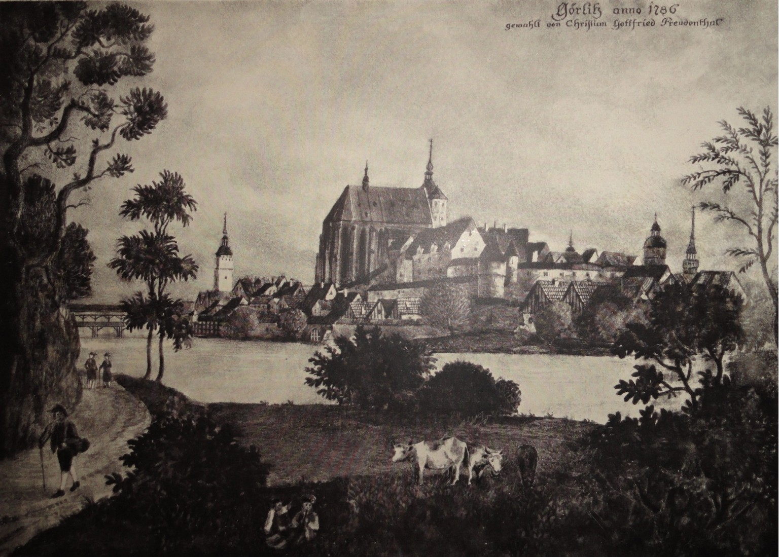 Ansicht der ufernahen Altstadt und der Görlitzer Stadtbefestigung vom Ostufer der Neiße links: Neißebrücke und Neißeturm Mitte: St. Peter und Paul und Vogtshof rechts: Nikolaiturm